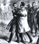 Pintura del Abrazo de Acatempán, en dominio público.